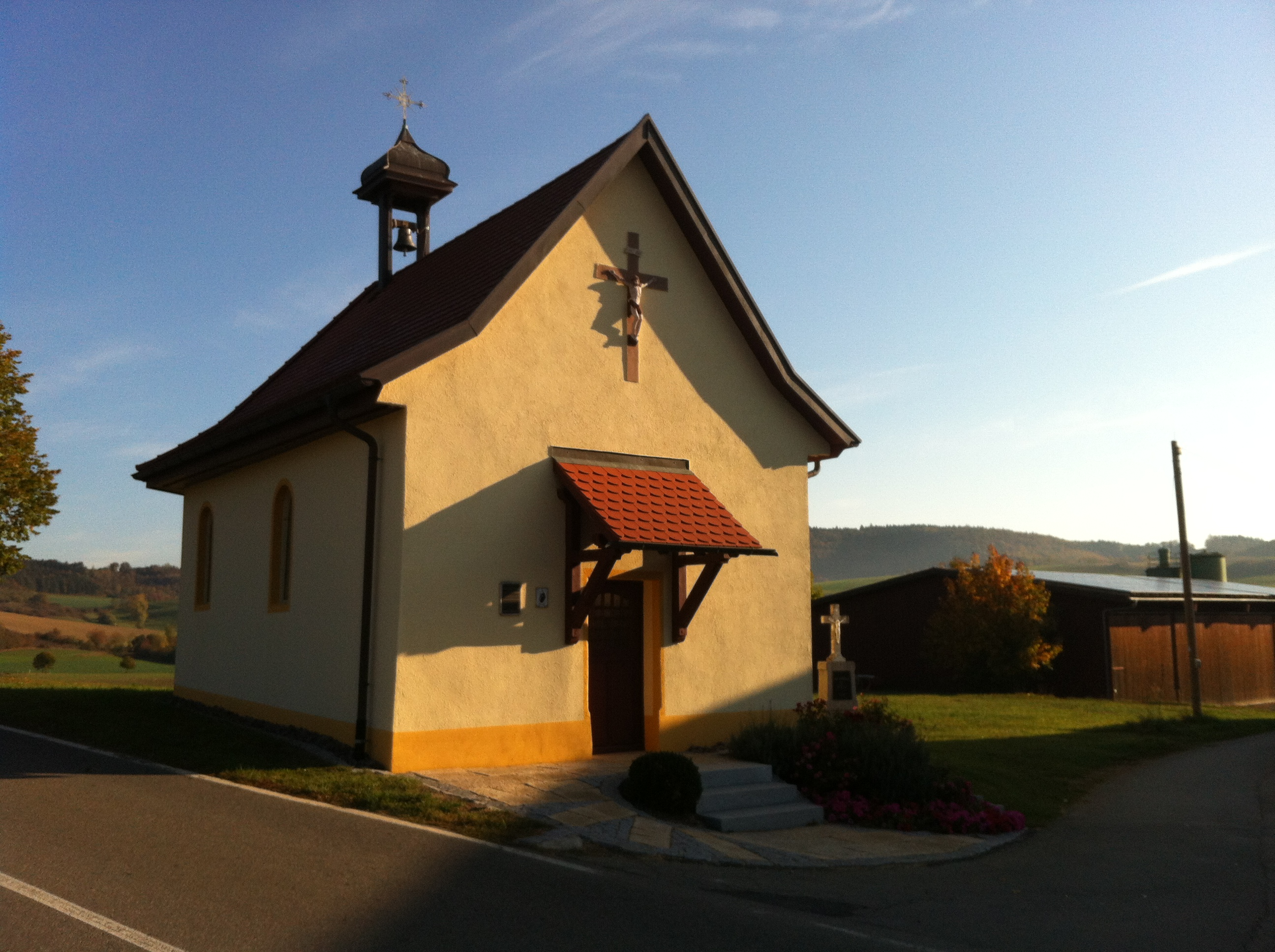 Antonius-Kapelle in Fützen, Ortsteil von Blumberg, Stadt im Schwarzwald-Baar-Kreis in Baden-Württemberg.